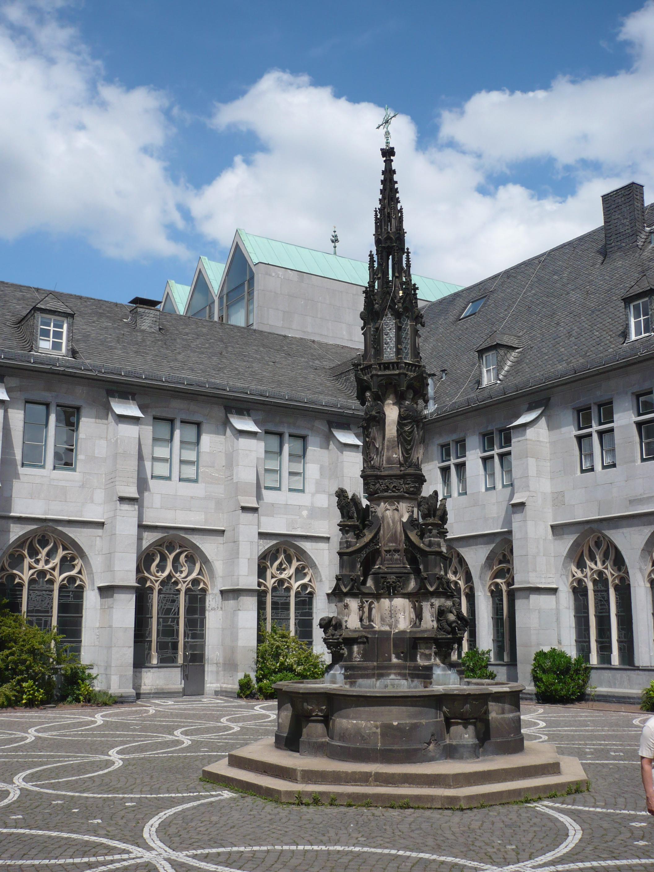 Ecke des Kreuzganges des Aachener Doms mit Paradiesbrunnen im Atrium. Im Hintergrund Dach der Domsingschule